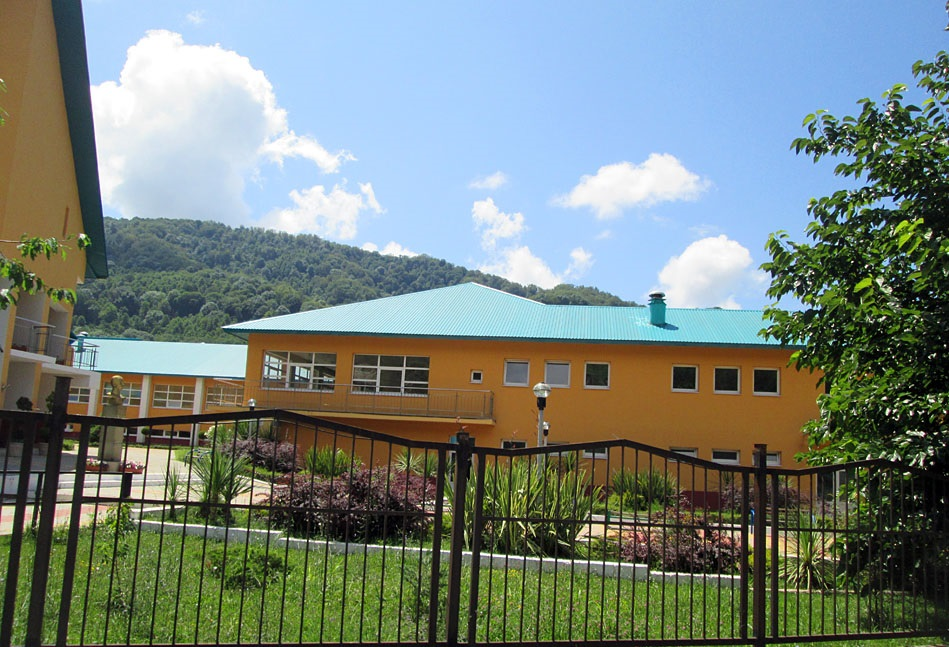 Средняя школа в ауле Большой Кичмай